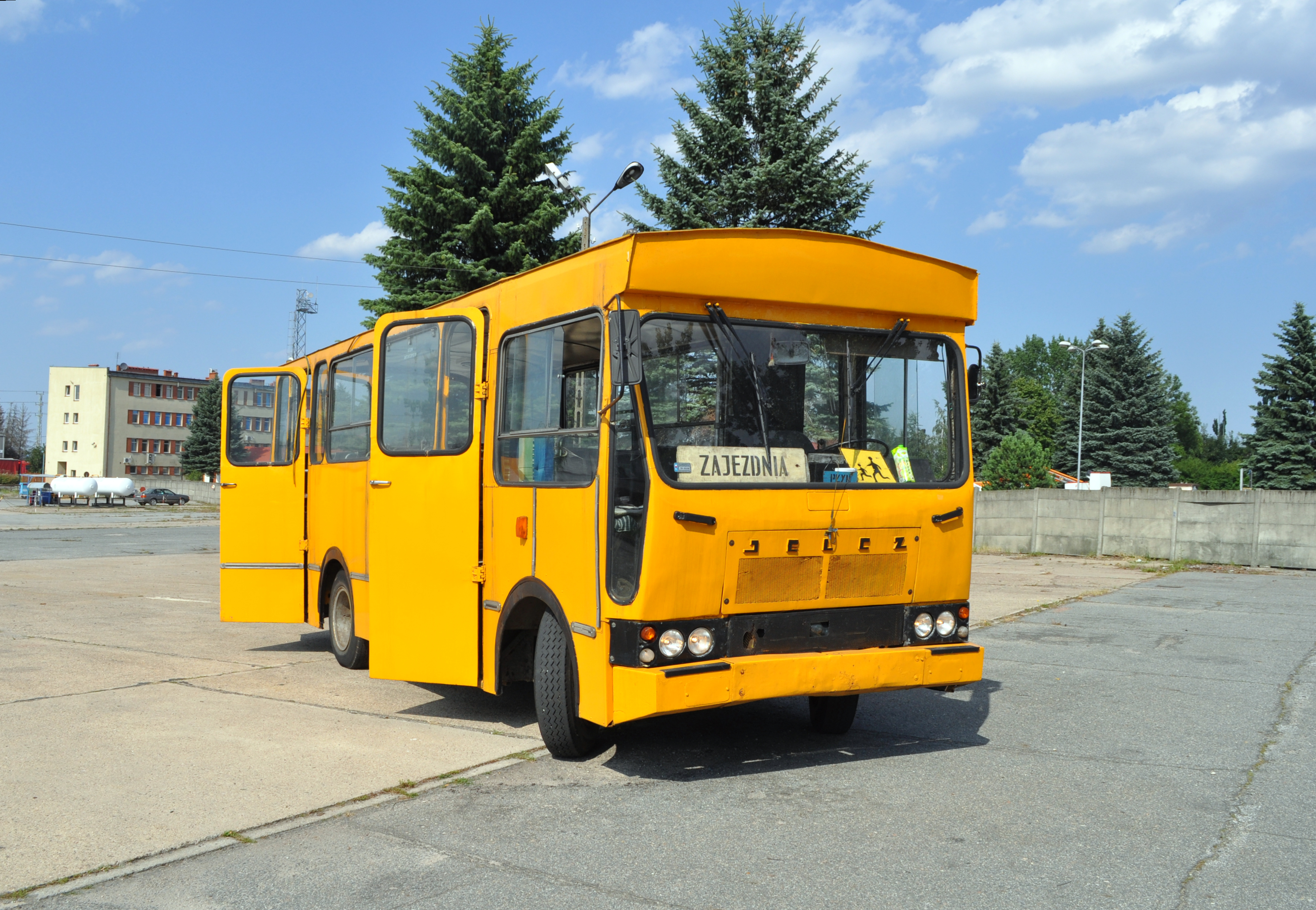 Jelcz 080. Zdjęcie wykonane dzięki uprzejmości Adama Zylbertala z Klubu Sympatyków Transportu Miejskiego z Wrocławia. jelcz080.pl